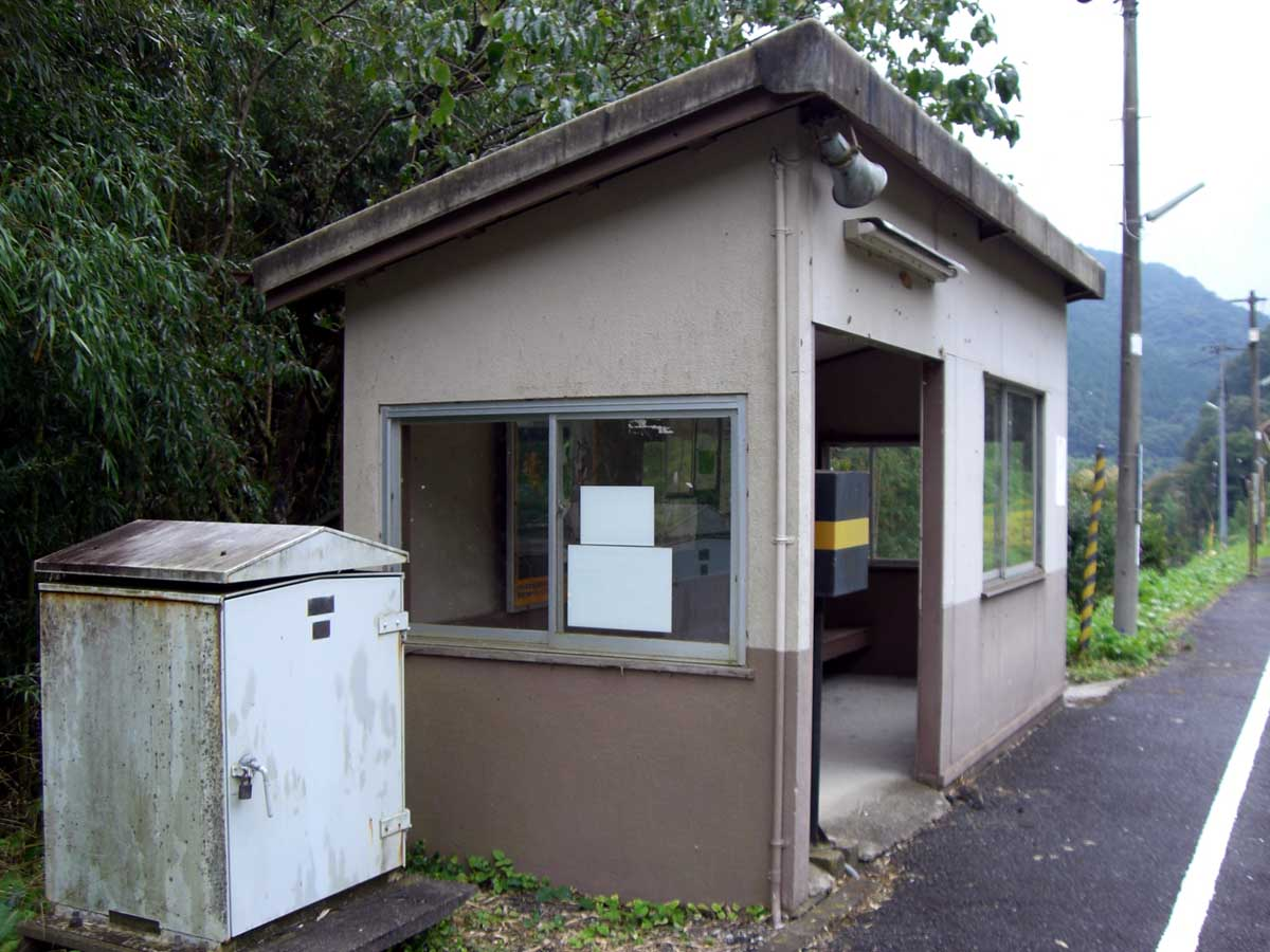 撮影地、撮影場所…JR芸備線、内名駅の待合室。撮影年月日…2006年9月17日